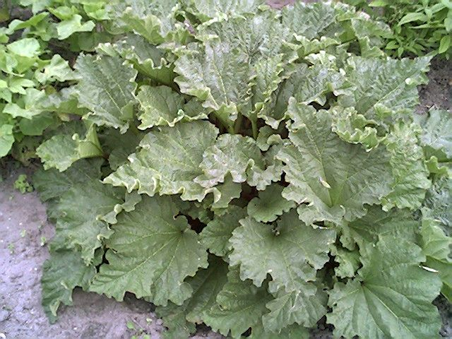 Rabarber. Serie foto's van een rabarberplant van 25 maart 2005 tot en met 13 mei 2005, één foto per week. Bestandsnamen: Rabarber-serie-1.jpg tot Rabarber-serie-8.jpg. Foto zelf gemaakt. Public Domain.